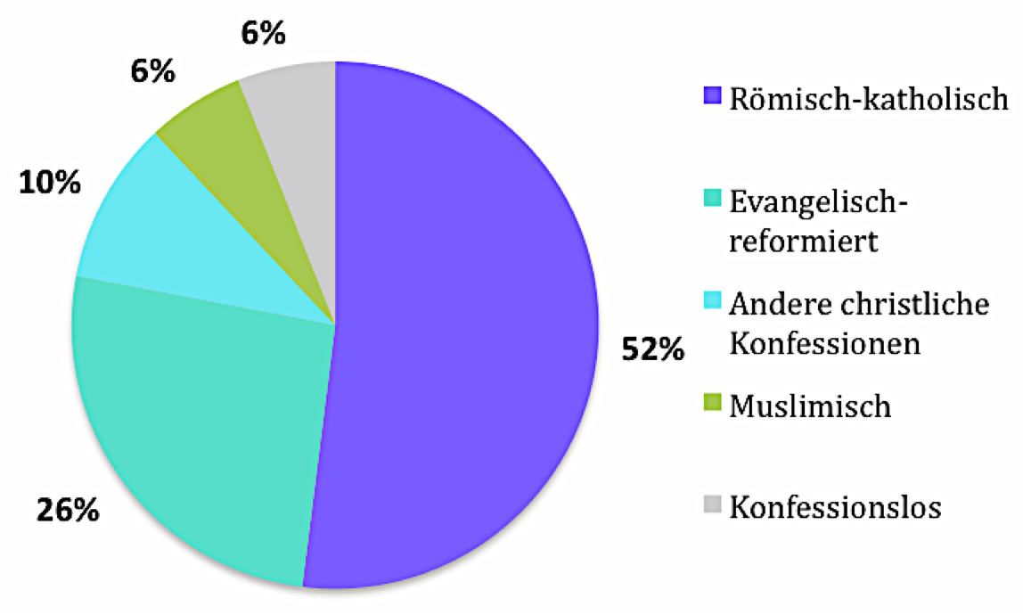 Konfessionsverteilung im Kanton St. Gallen